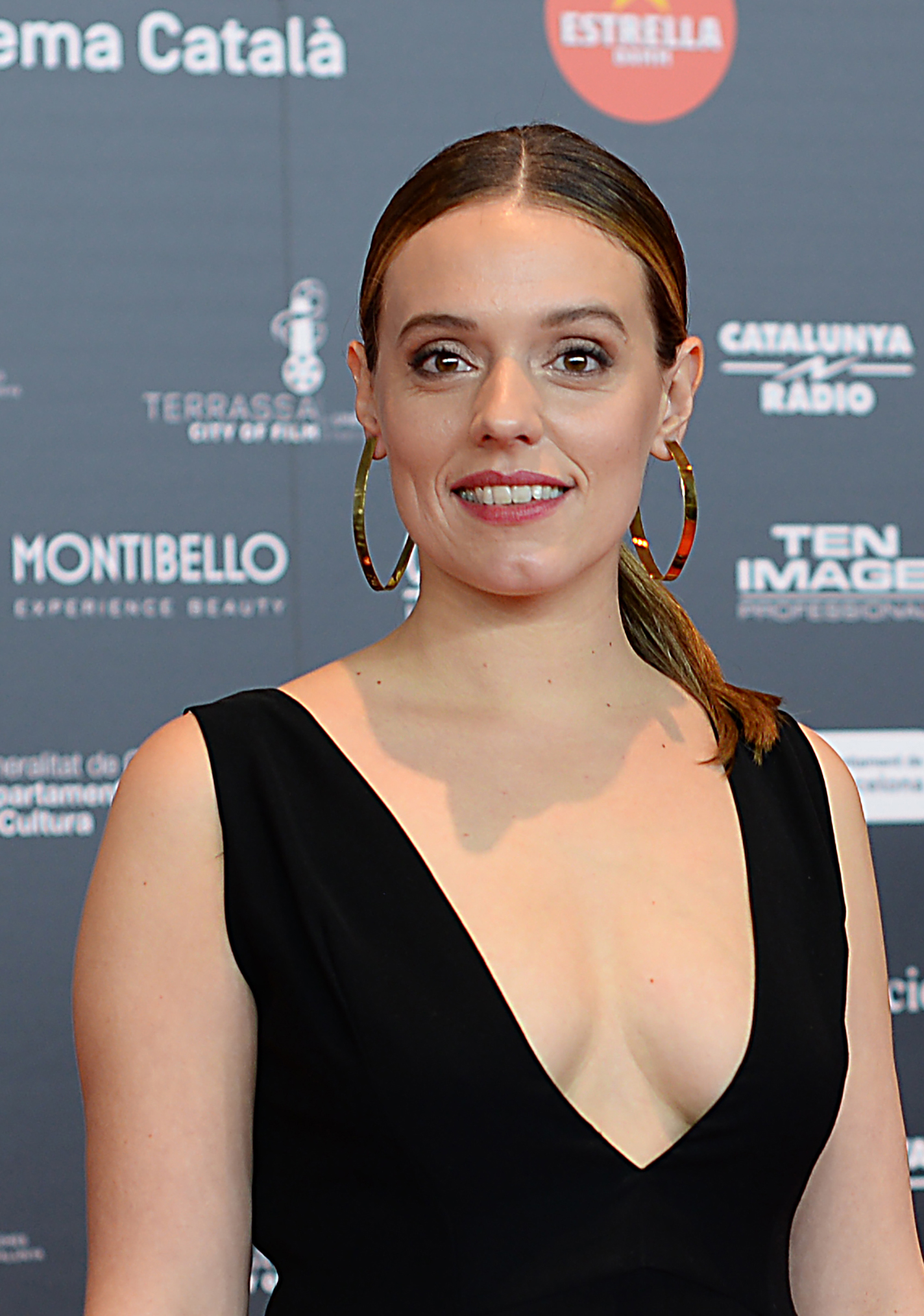 Maria Rodríguez Soto, actriu, XII Premis Gaudí (2020)